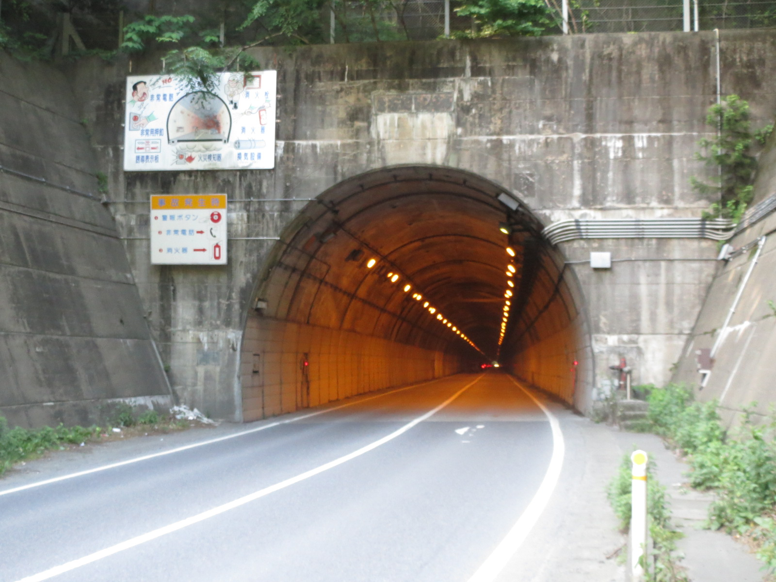 釜石市にある鳥屋坂トンネル